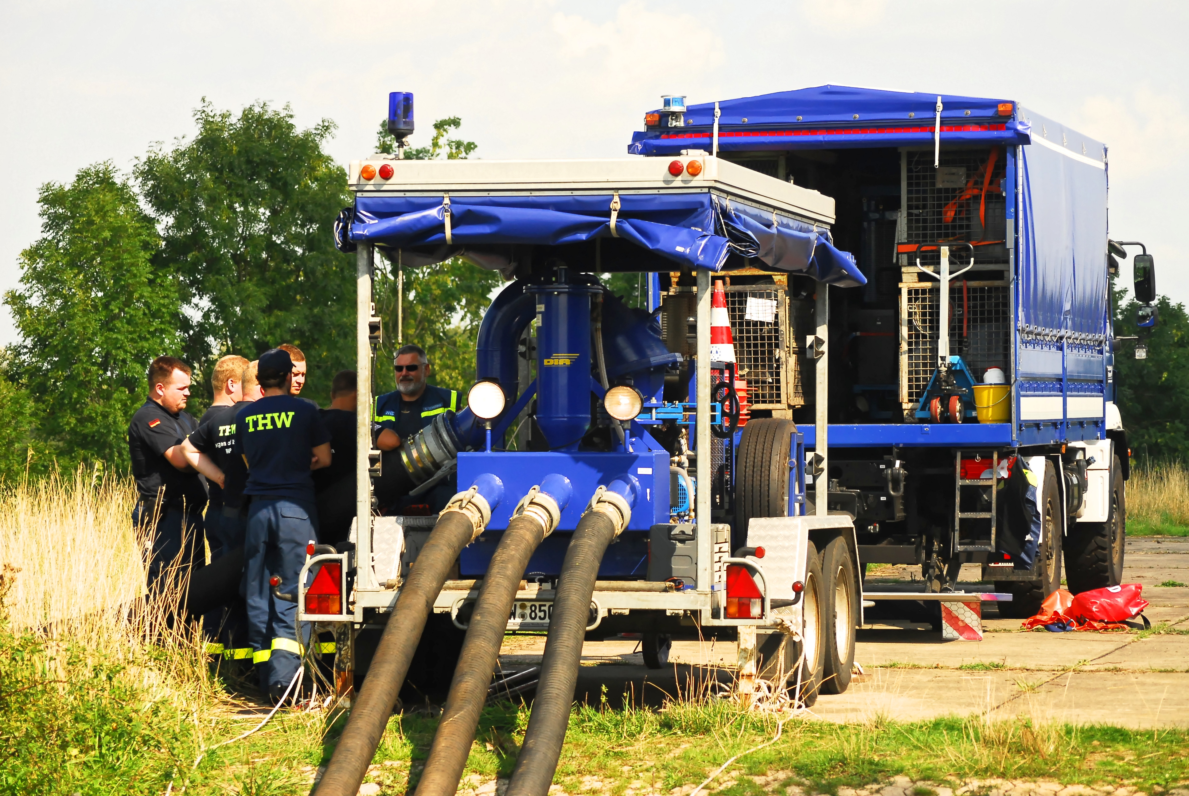 THW Havariepumpe DIA, 15000l Kanalrad Pumpe